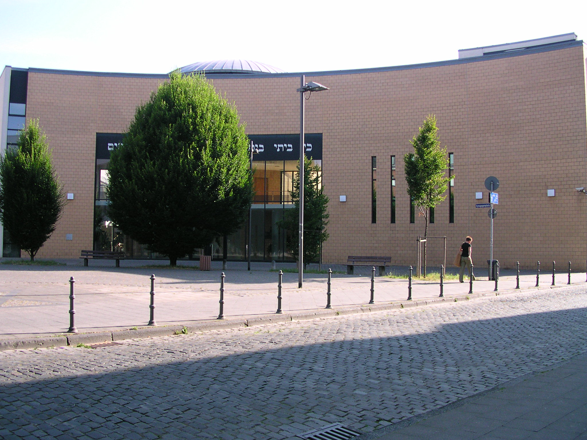 Aachen, neue Synagoge (Architekt Alfred Jacoby 1995). Inschrift: “Mein Haus soll sein ein Haus des Gebets für alle Völker!”